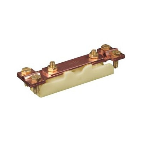 Barrette de connections de la terre à une installation électrique, permettant l'isolement temporaire pour effectuer les mesures nécessaires à la vérification de la prise de terre.